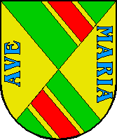 Escudo de Collado Villalba (Madrid)